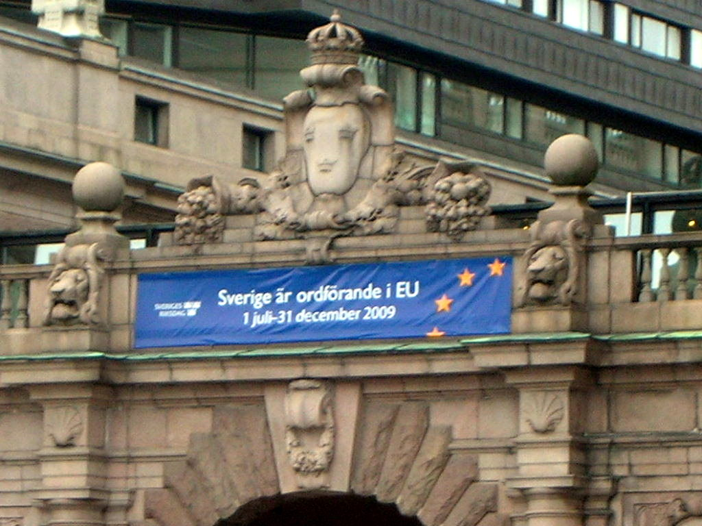 Banderoll med texten "Sverige är ordförande i EU 1 juli-31 december 2009" på Riksdagshuset i Stockholm.